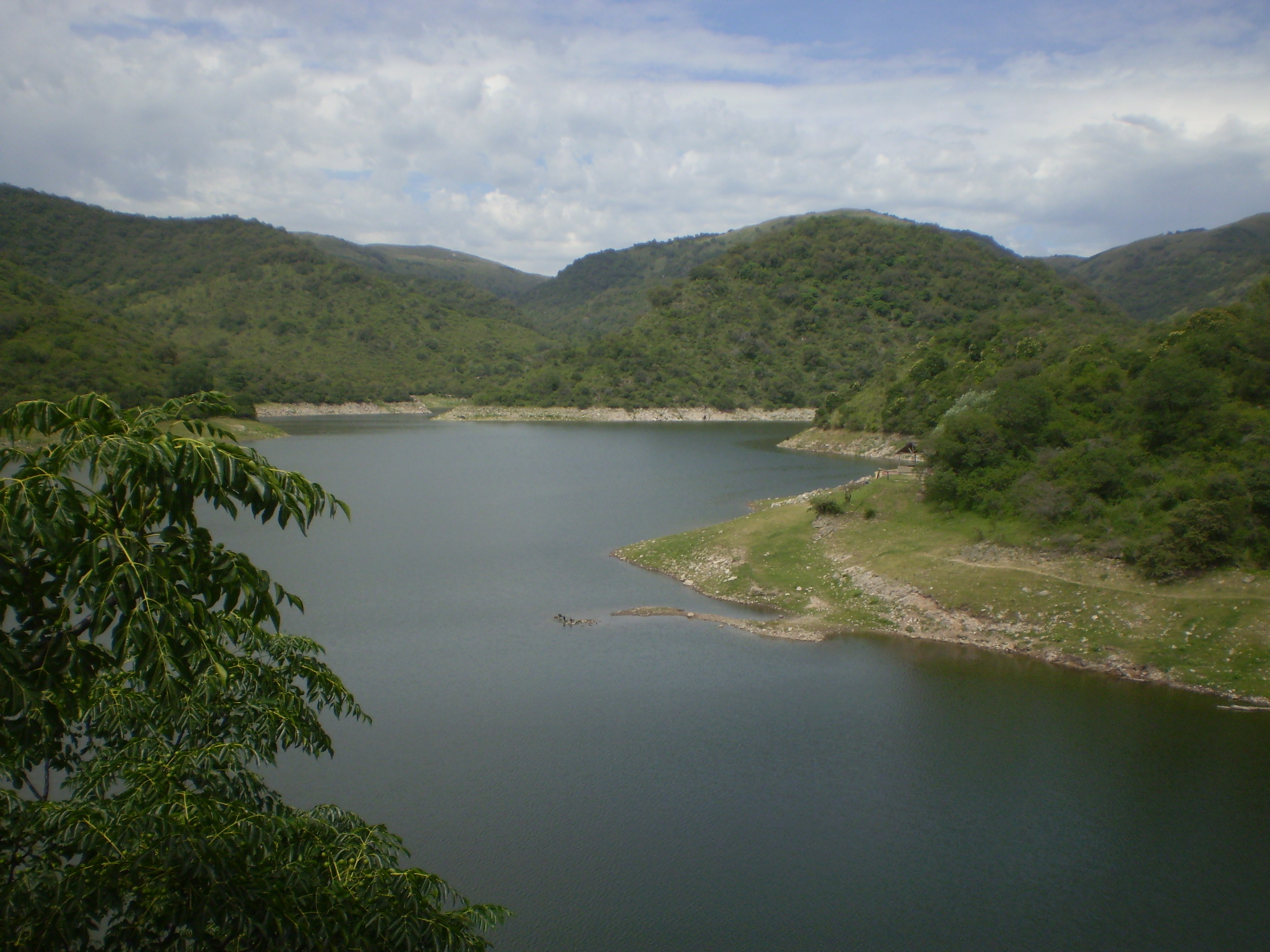 Lago del embalse del dique La Quebrada, Rio Ceballos Cordoba, Argentina